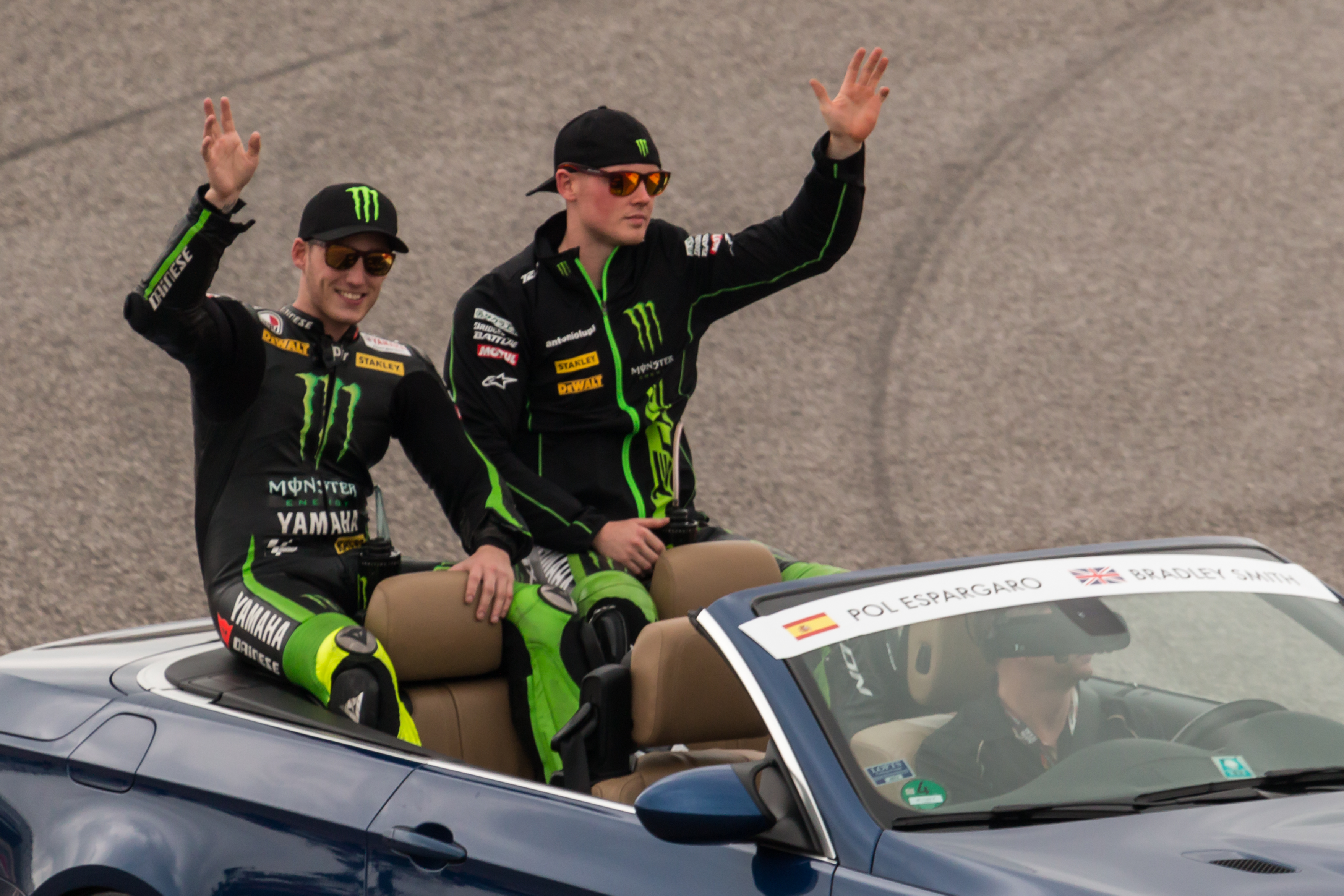 P. Esparagaro and Smith